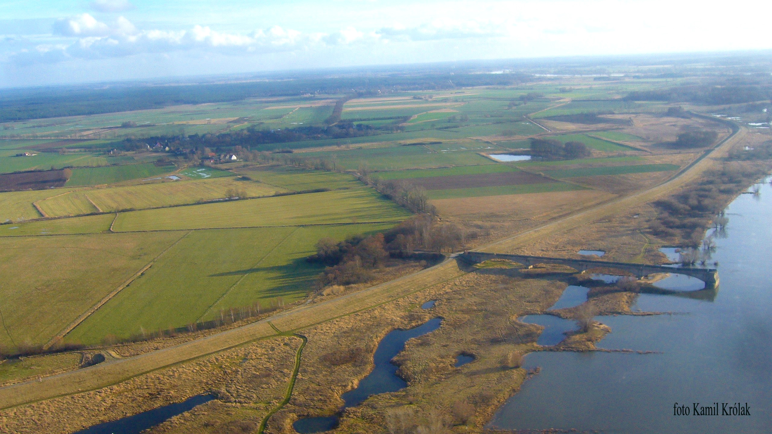 Wschodni (polski) brzeg Odry. Zniszczony most na Odrze w Kłopocie. Autor Kamil Królak